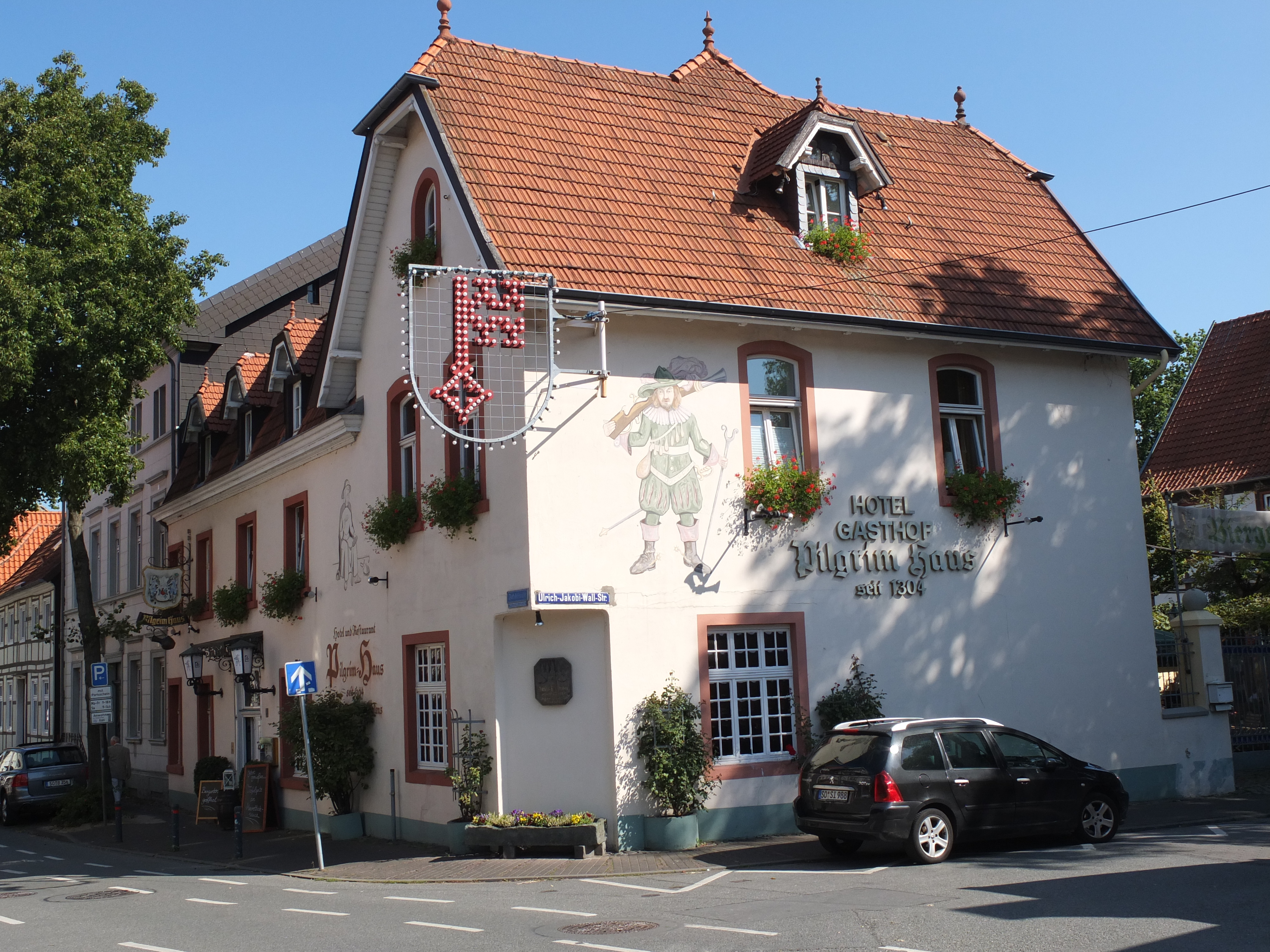 Pilgrimhaus in SoestThis is a photograph of an architectural monument.It is on the list of cultural monuments of Soest